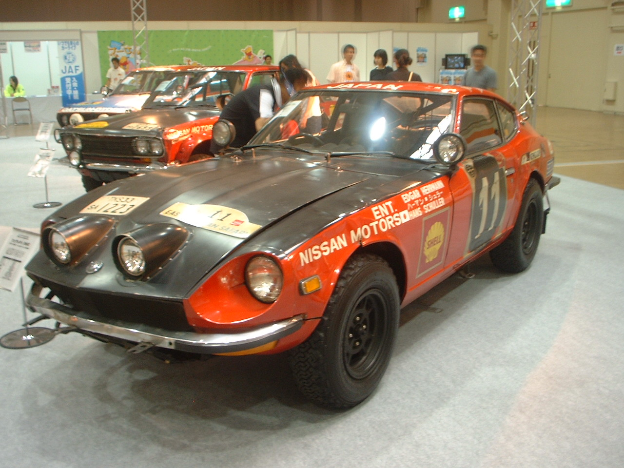 Nissan FairladyZ Gr.4rallycar